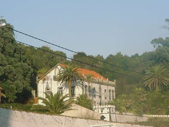 Vila Maria, freguesia de São Pedro, Angra do Heroísmo, Açores, Portugal.